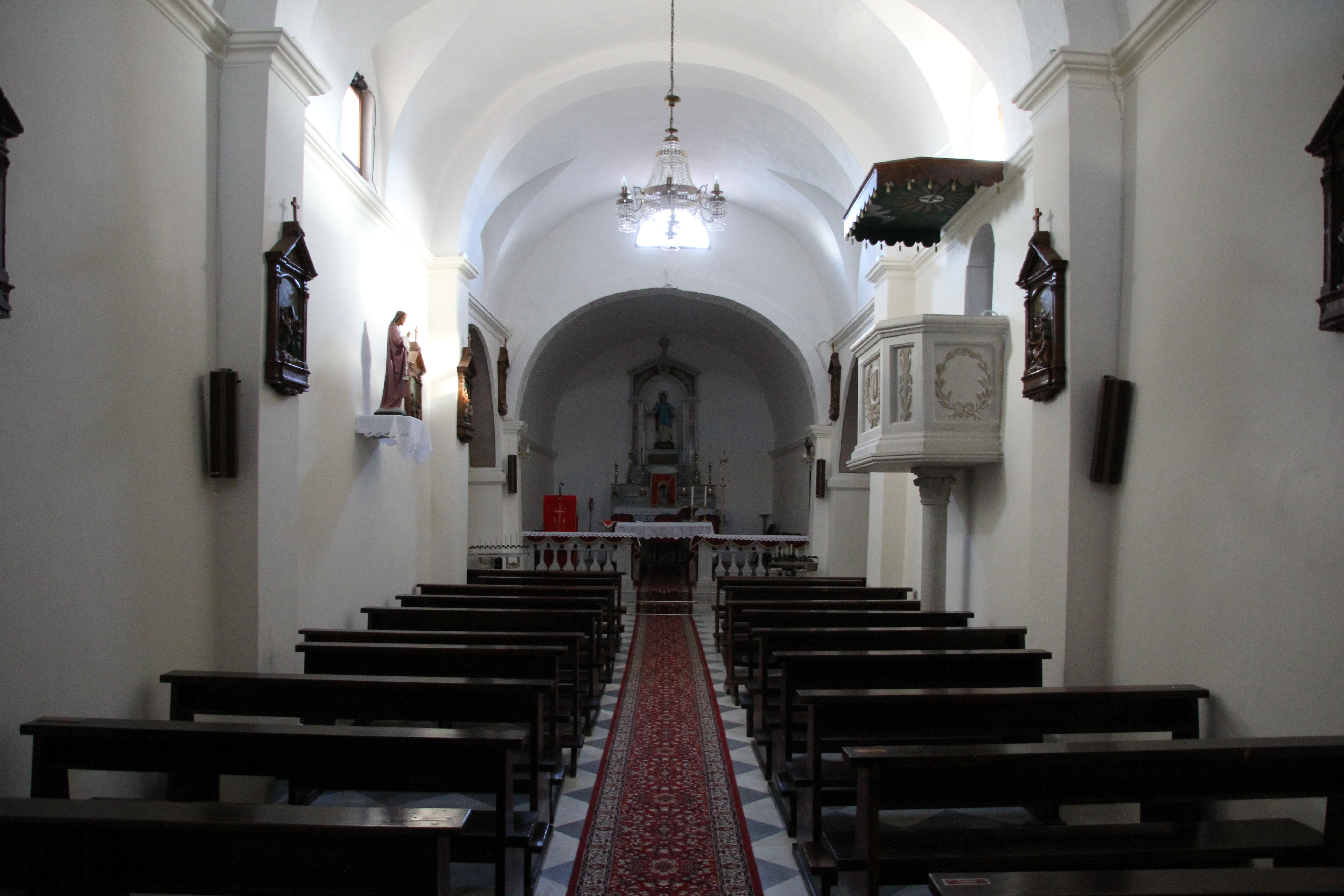 Tissi, chiesa di Santa Vittoria